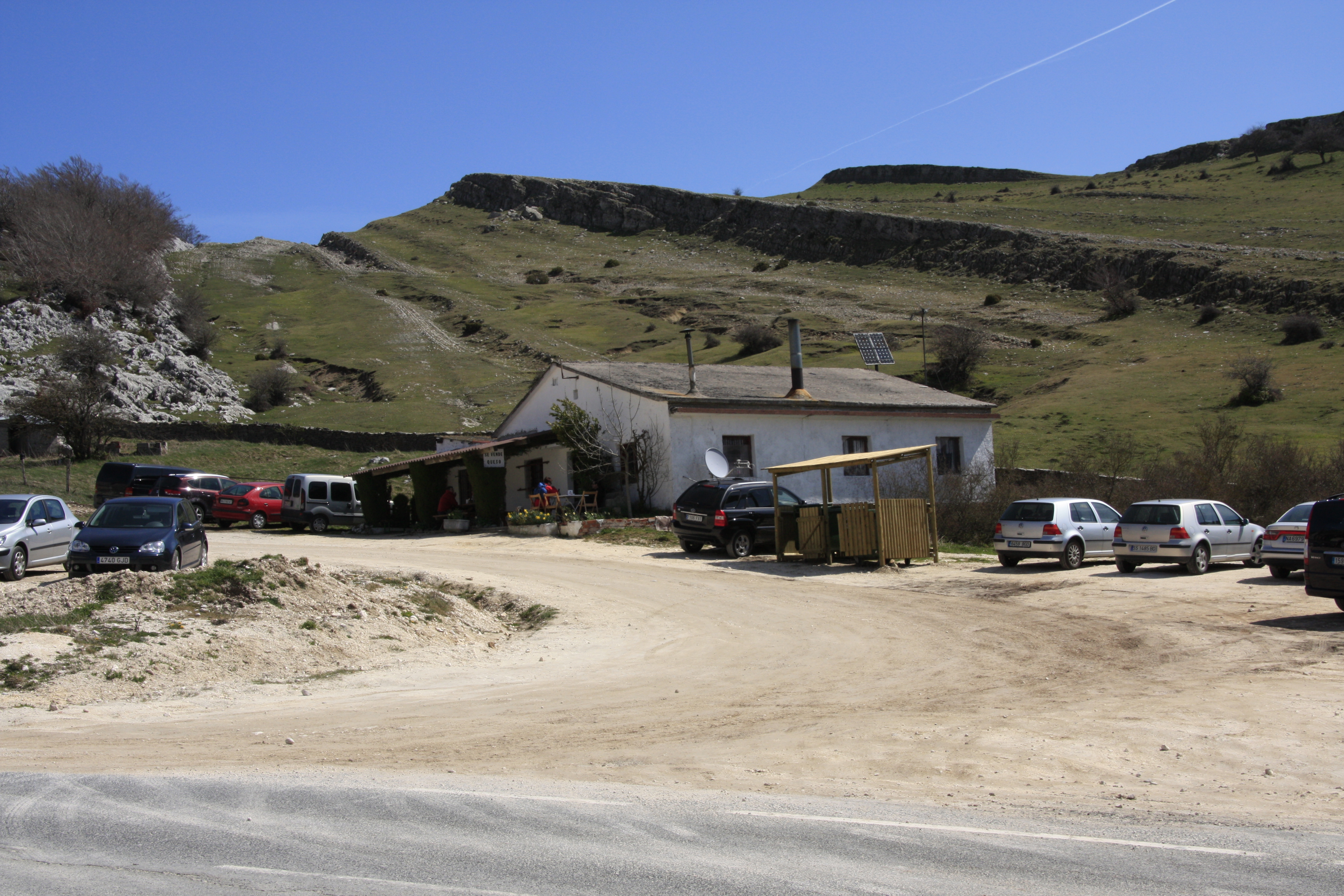 Tavern in Lizarraga mountain pass. Navarre, Basque Country. Lizarraga mendateko benta. Nafarroa, Euskal Herria.